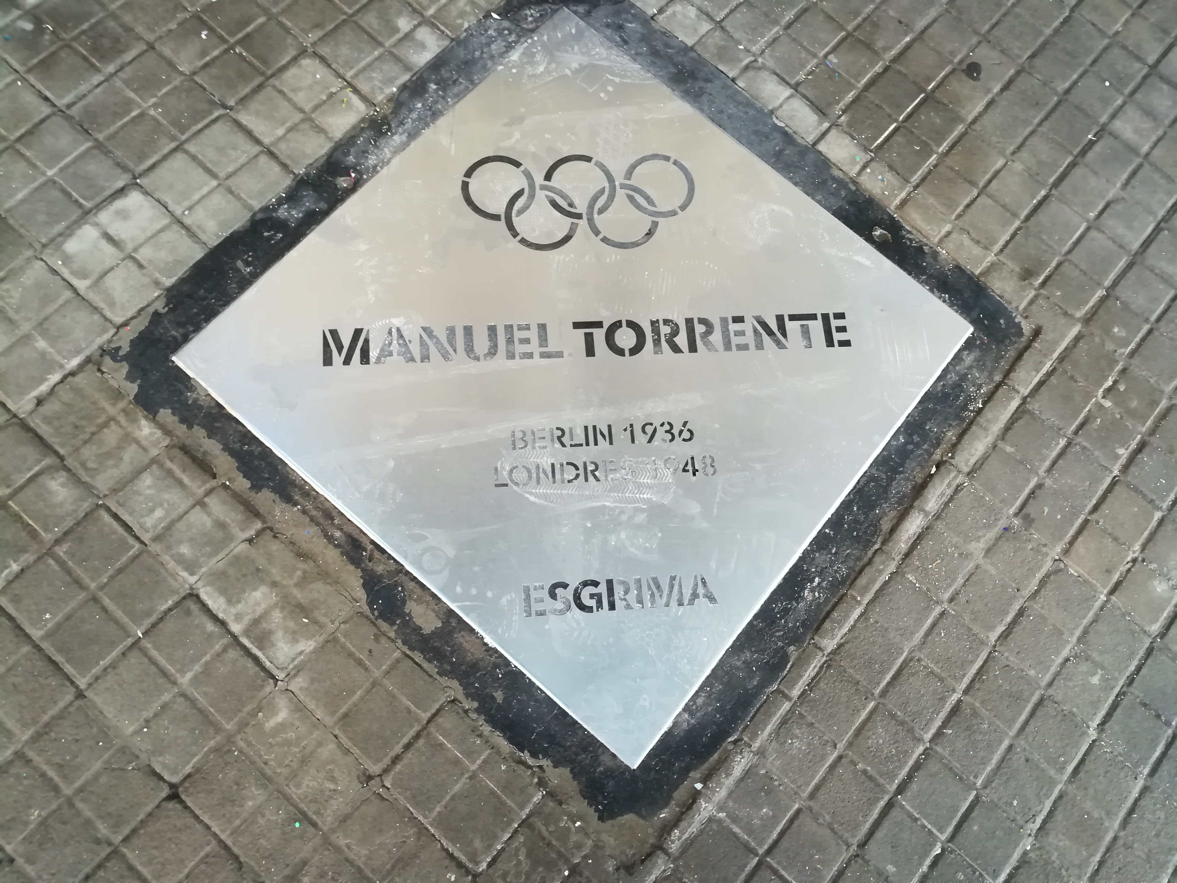 Paseo de los Olímpicos de los en la Avenida Pellegrini (Rosario).